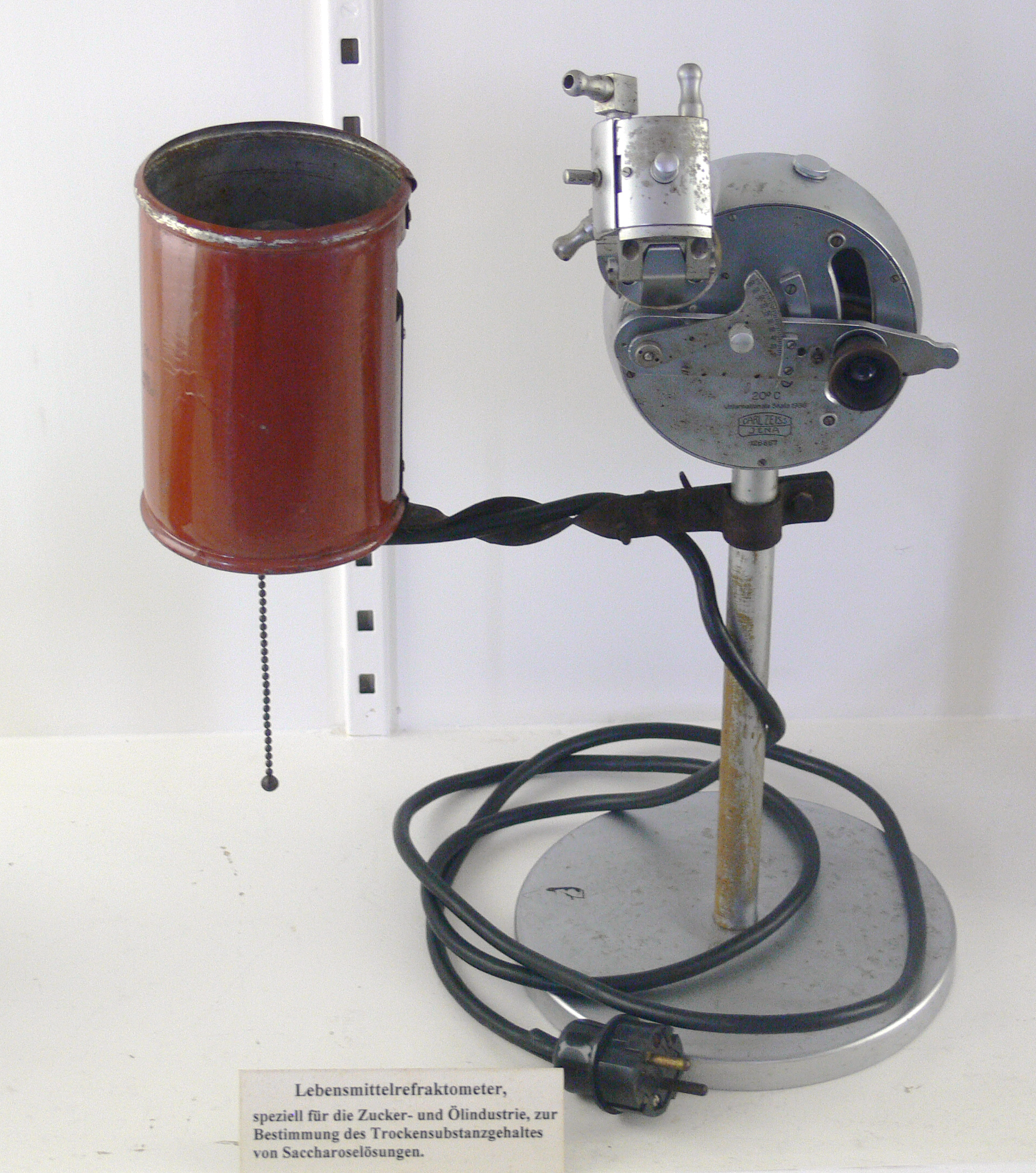 Lebensmittelrefraktometer, für die Zuckerindustrie und Ölindustrie, zur Bestimmung des Trockensubstanzgehalts von Saccharoselösungen Zucker-Museum, Berlin